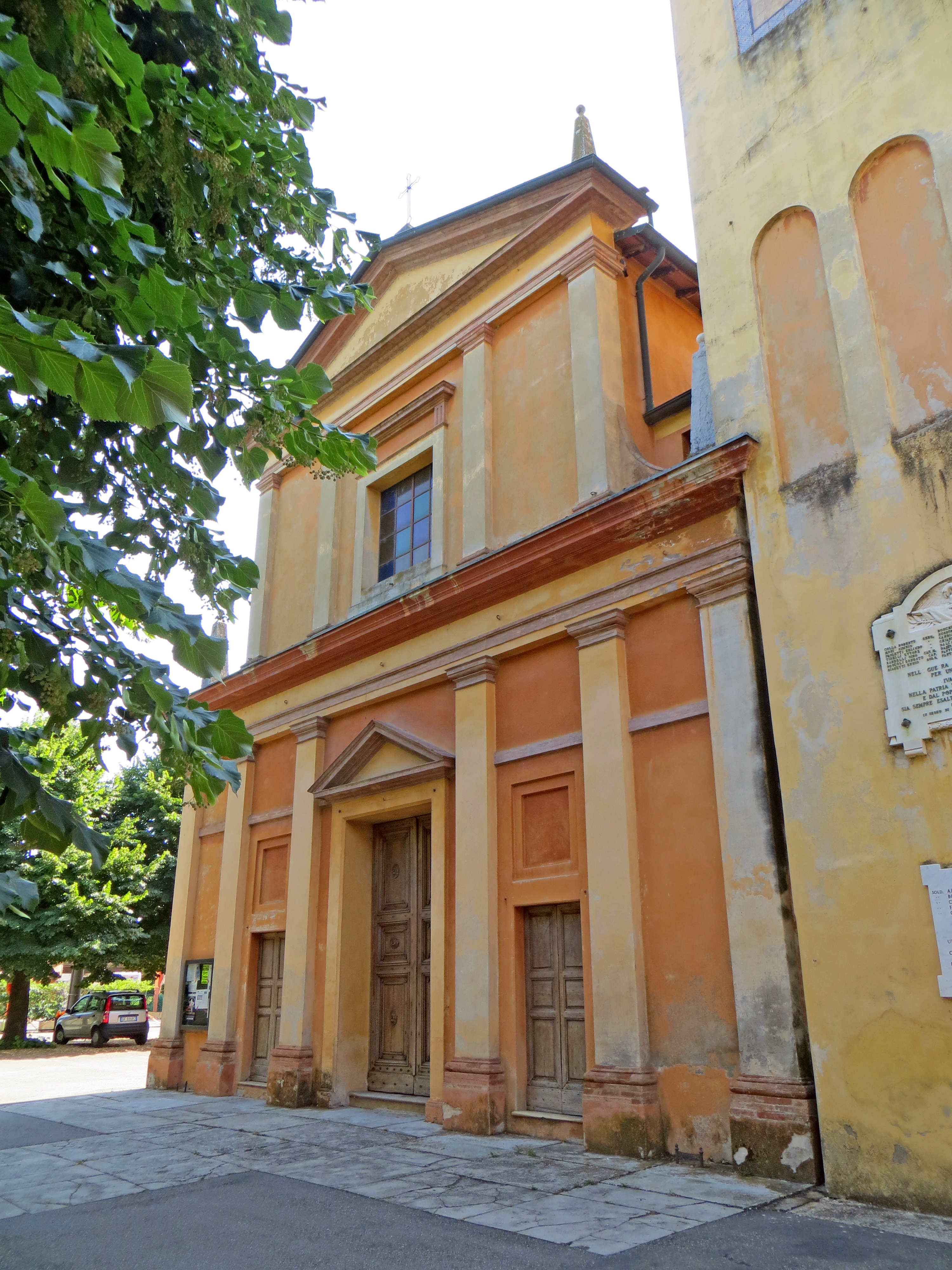 Chiesa di San Pietro (Vigatto, Parma) - facciata